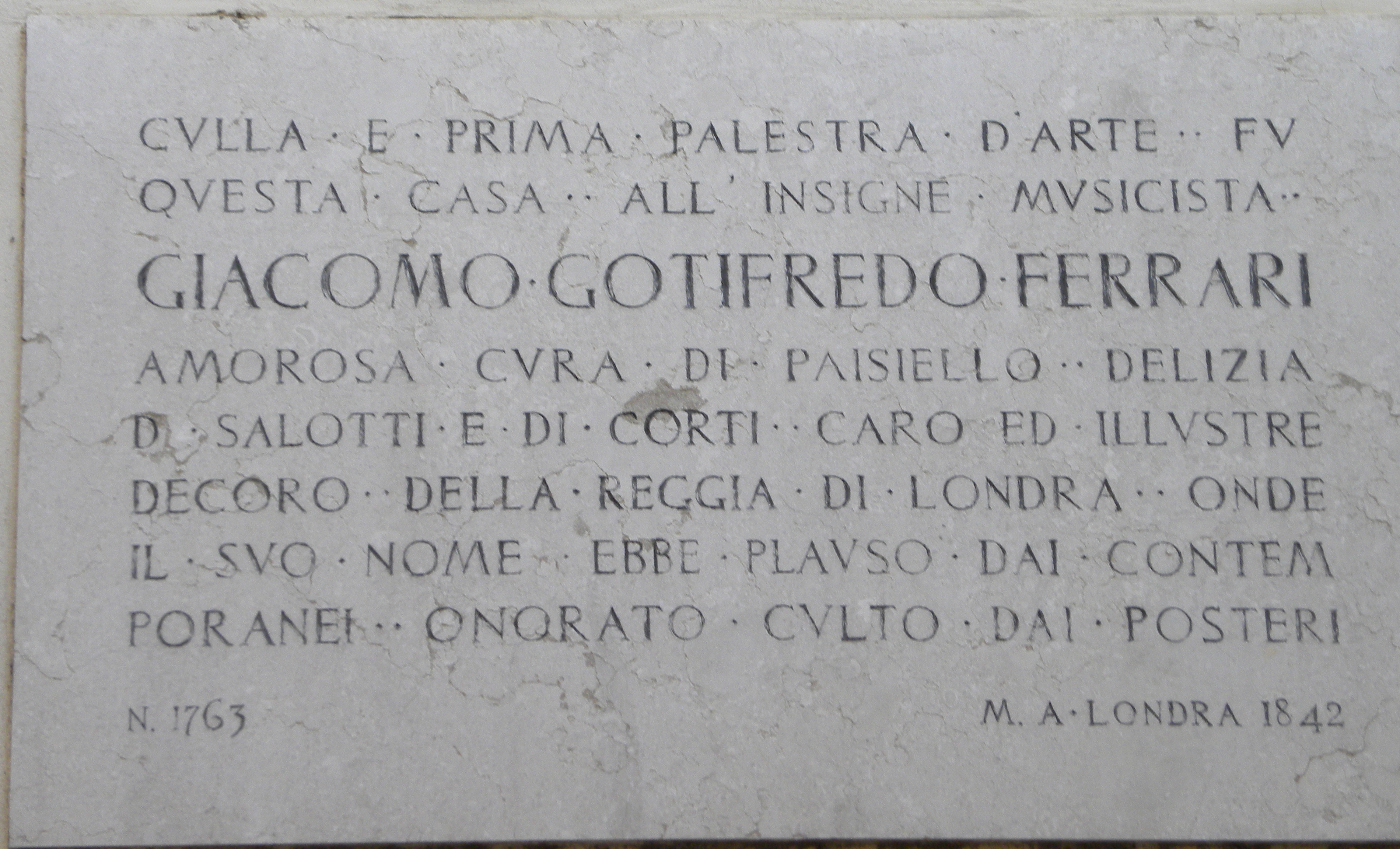 Lapide dedicata a Giacomo Gotifredo Ferrai in Via della Terra a Rovereto